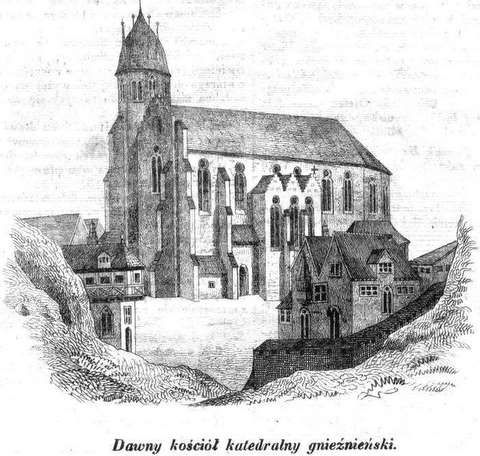 Katedra gnieźnieńska. Litografia z pisma "Przyjaciel Ludu" z 1843 r.